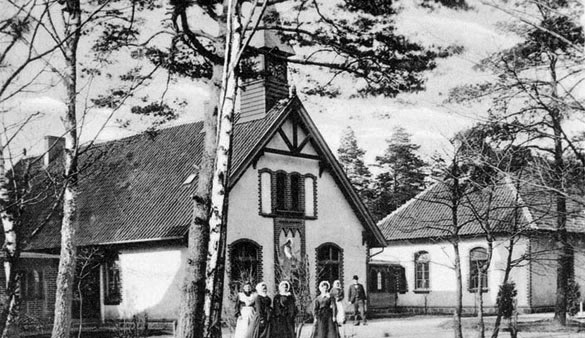 Lepraheim bei Memel